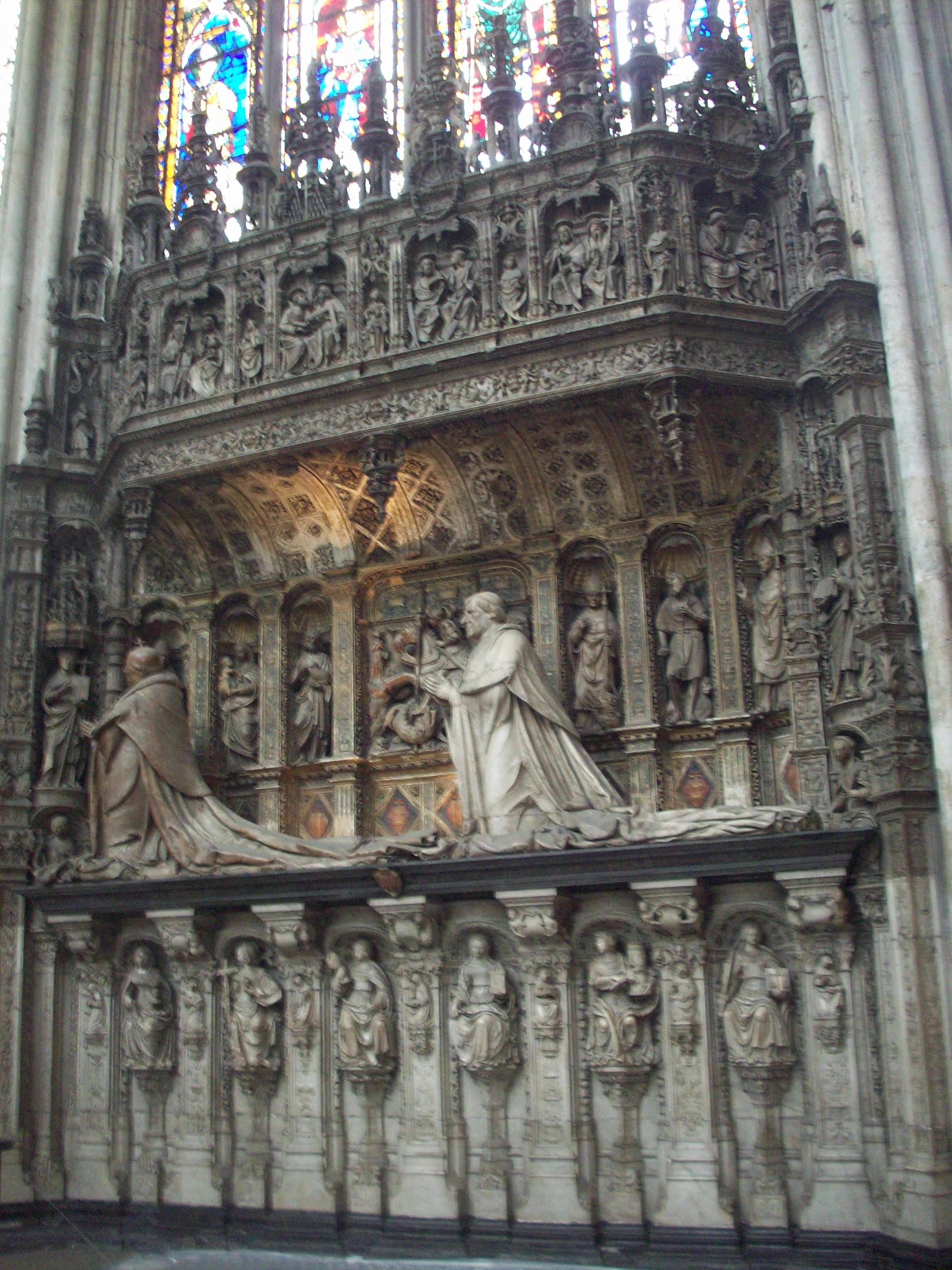 Mausolée des cardinaux d'Amboise, œuvre de Roulland Le Roux et Pierre des Aubeaux, chef-d'œuvre de la sculpture du début du XVIe siècle, dans la chapelle de la Vierge de la cathédrale de Rouen.